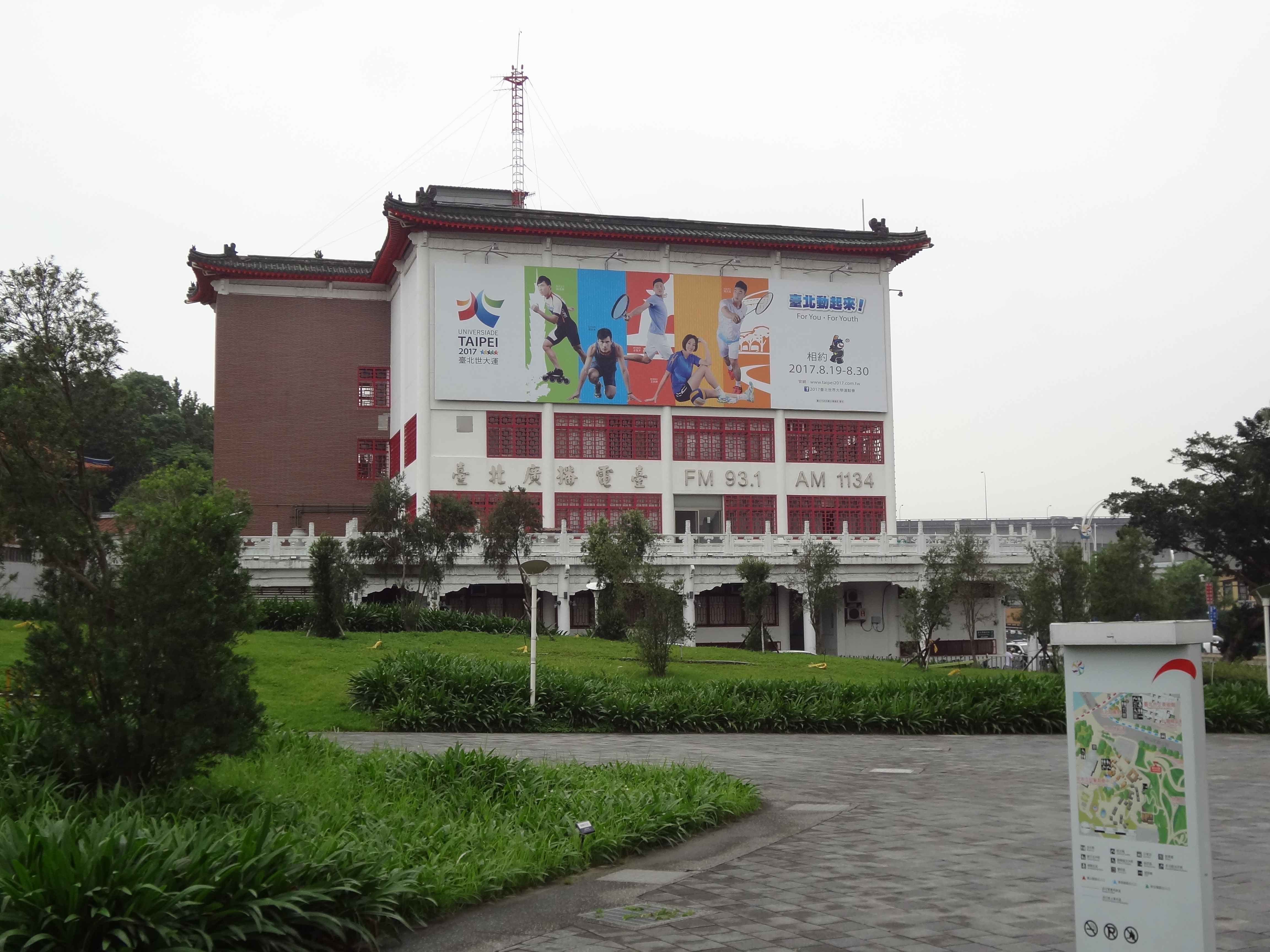 中文（台灣）: 臺北廣播電臺與臺北市政府警察局中山分局圓山派出所，地址：臺北市中山區中山北路三段62號。